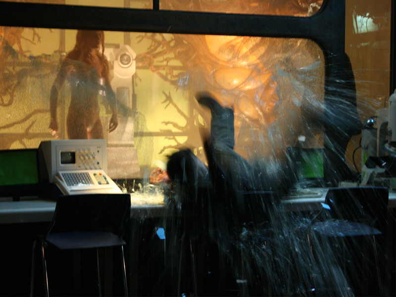 Caida dinamica Ejemplo 1